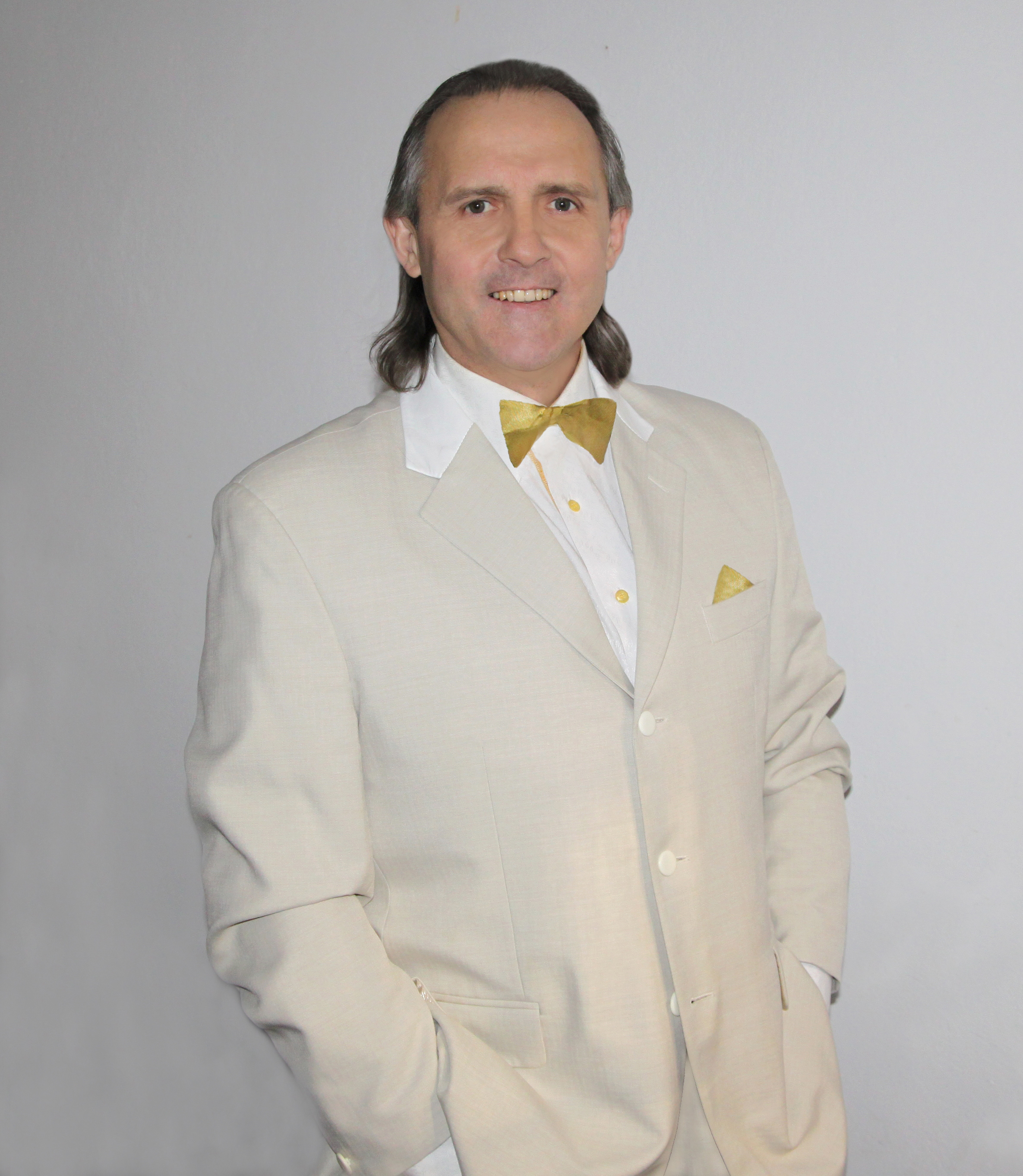 Ярослав Музика. м.Львів. Ювілей